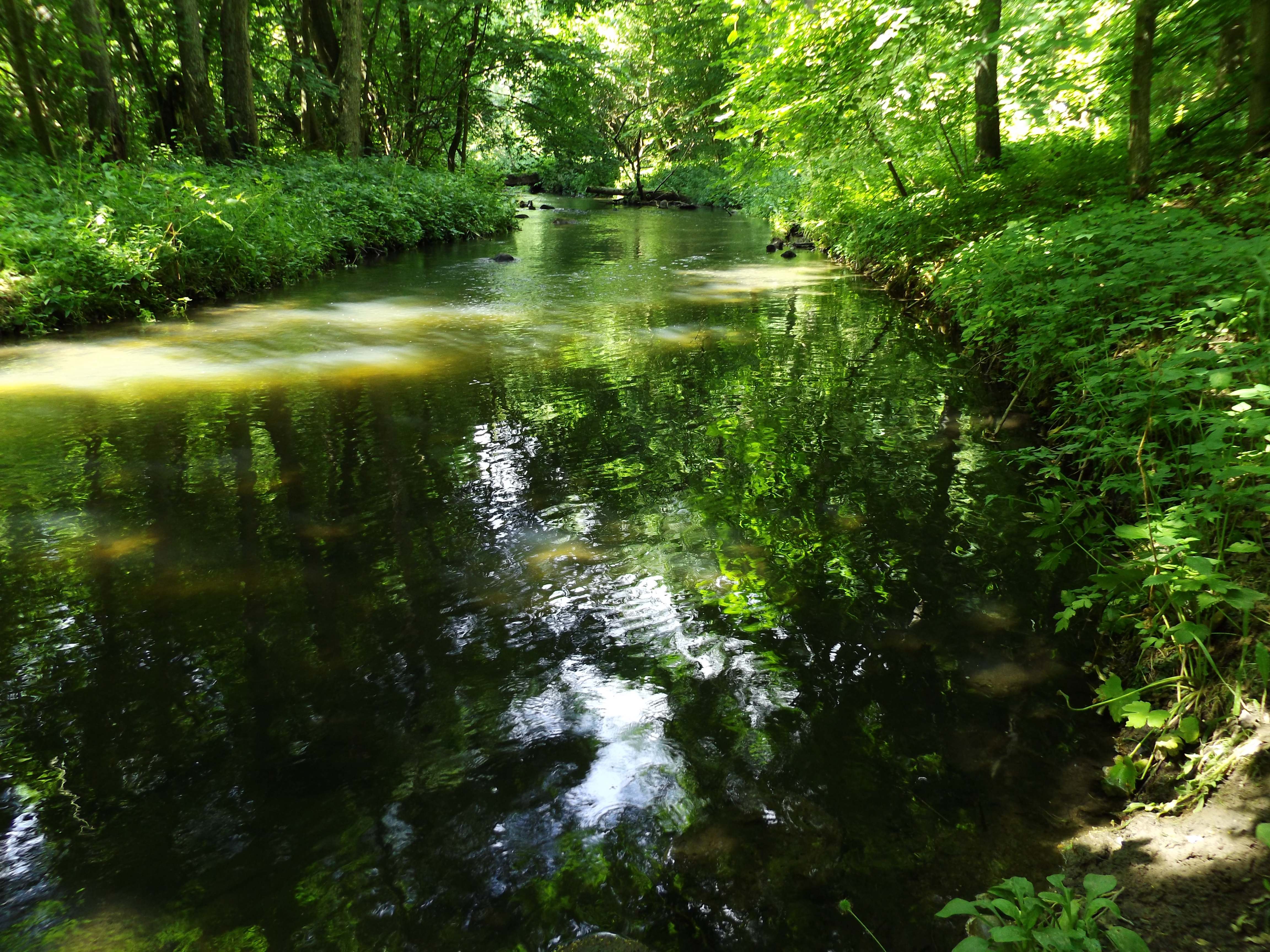 Rzeka Radunia koło wsi Bielkówko